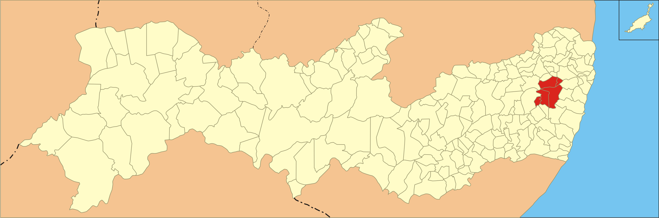 Localização de Microrregião de Vitória de Santo Antão em Pernambuco.